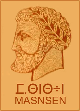 Le roi Numide : Massinissa Version améliorée de l'image Image:Massinissa2.jpg importée par Mokraoui